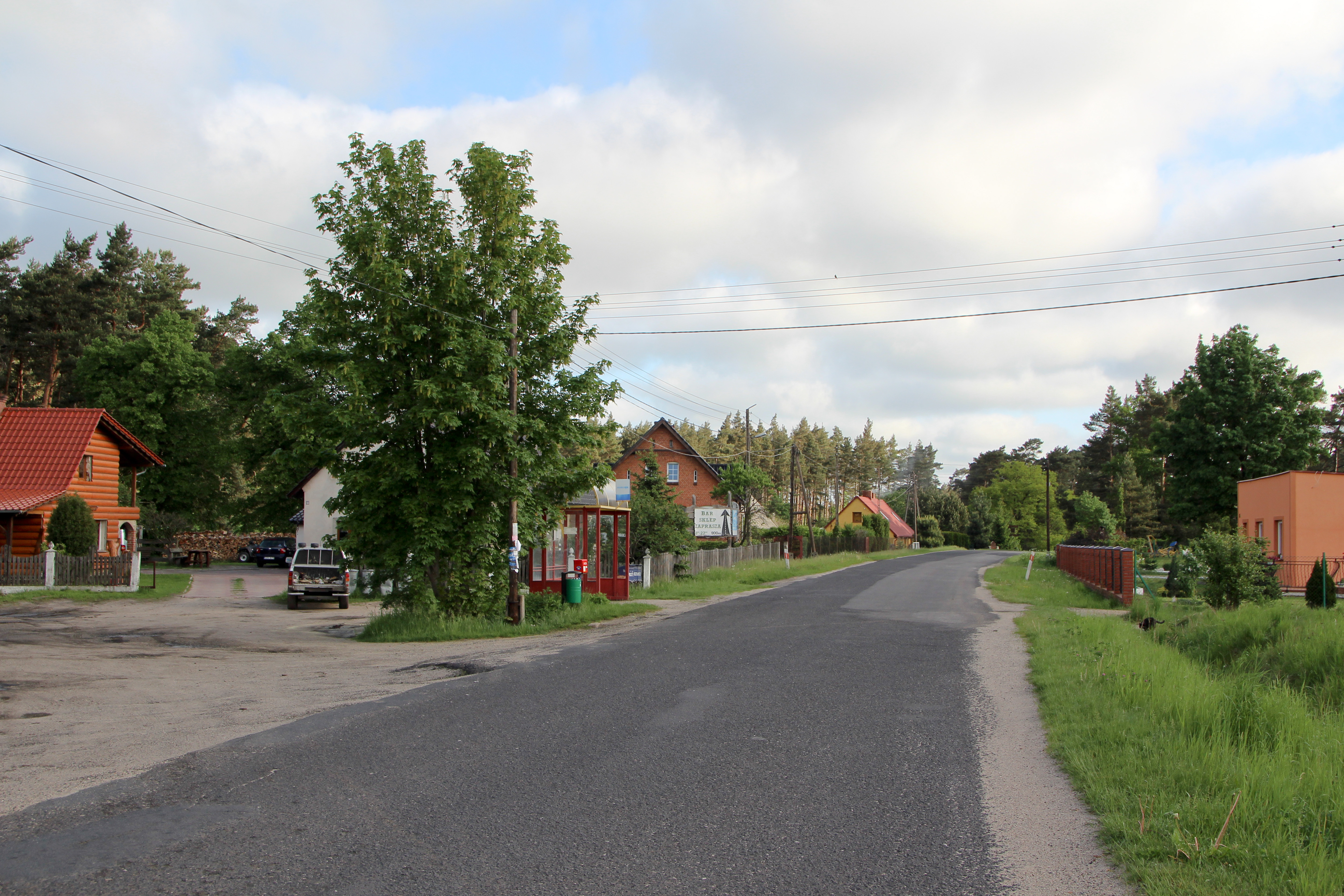 Droga wojewódzka nr 351 w Bielawie Dolnej - wieś w Polsce w województwie dolnośląskim w powiecie zgorzeleckim, w gminie Pieńsk.